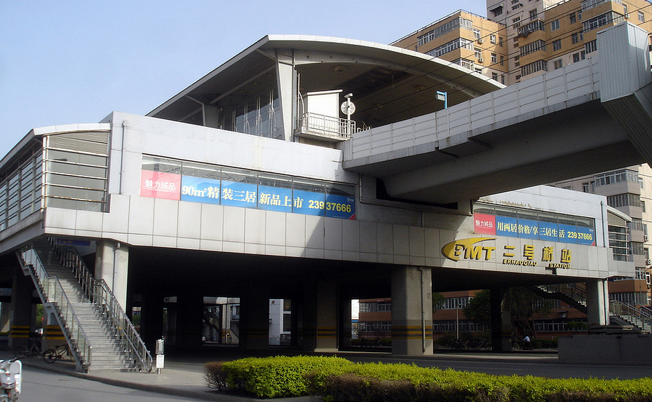 中文（中国大陆）: 二号桥站(地铁津滨线)